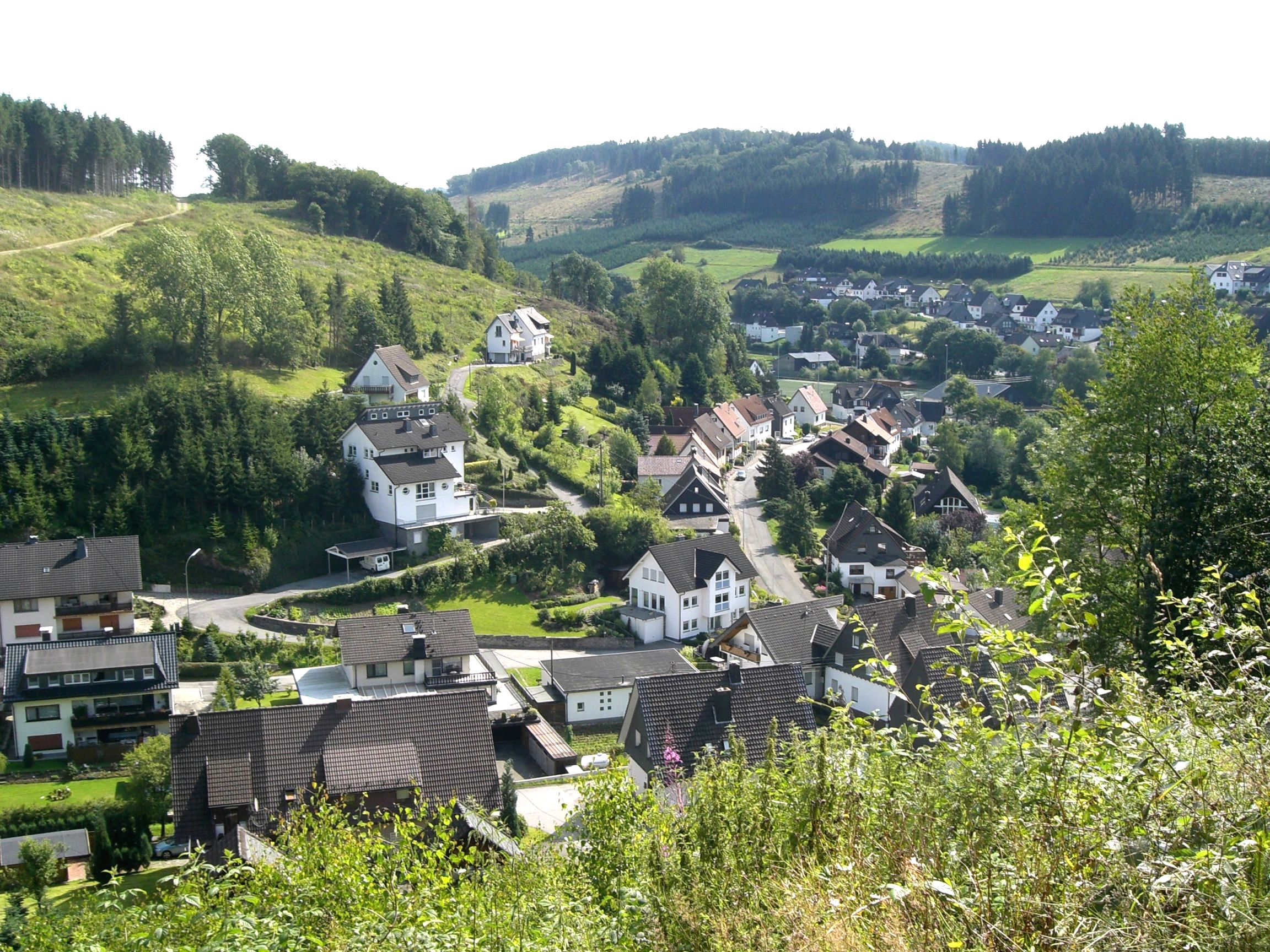 Sicht vom Höhenweg über dem Friedhof